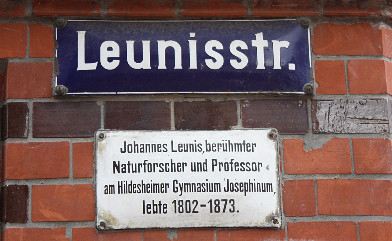 Straßenschild der Leunisstraße in Hildesheim mit gesonderter Legenden-Tafel: „Johannes Leunis, berühmter Naturforscher und Professor am Hildesheimer Gymnasium Josephinum, lebte 1802–1873.“ ...